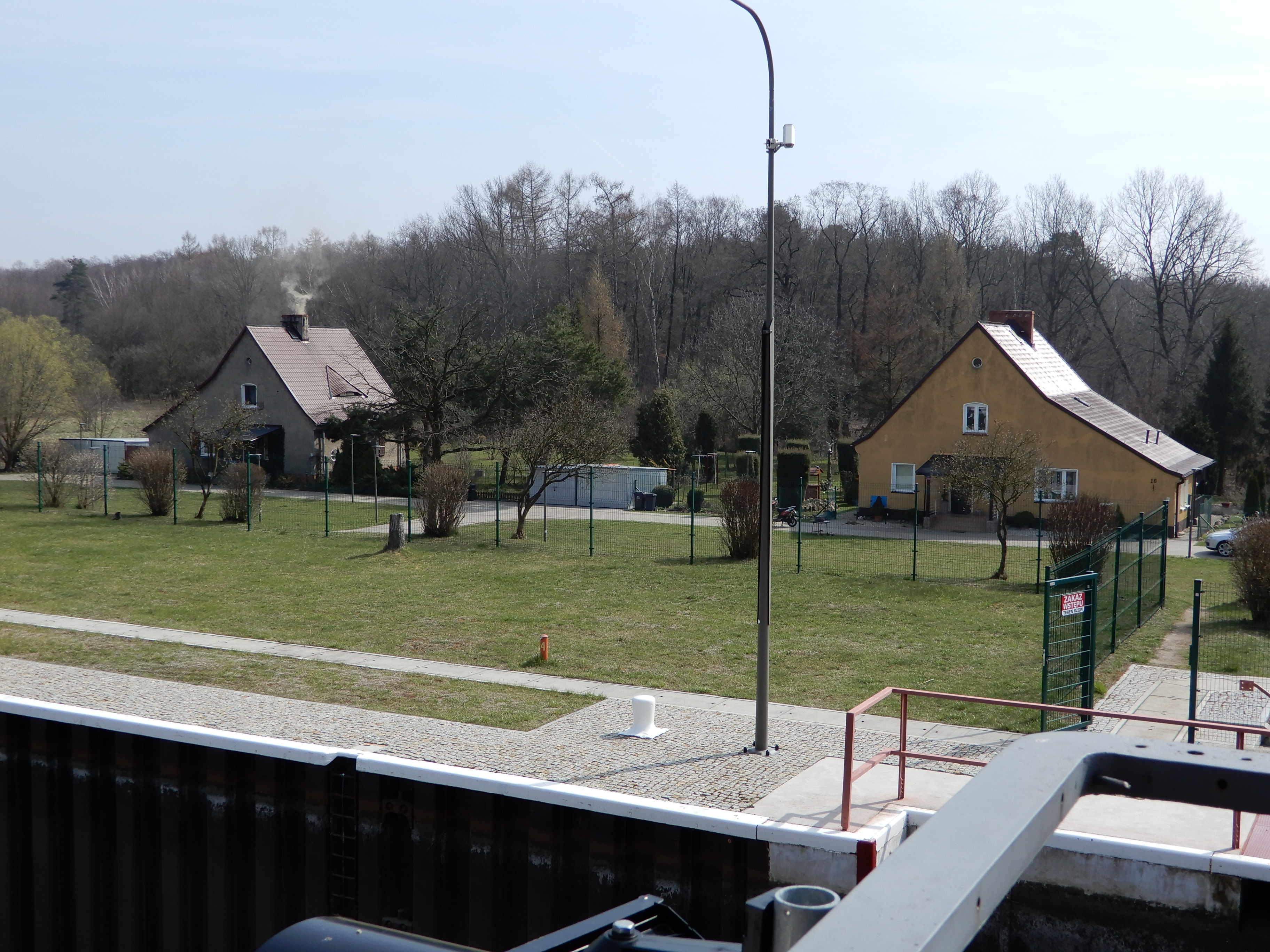 Śluza Rudzienic, śluza nr IV zlokalizowana na 21,5. km Kanału Gliwickiego, wybudowana w latach 1936-1938.